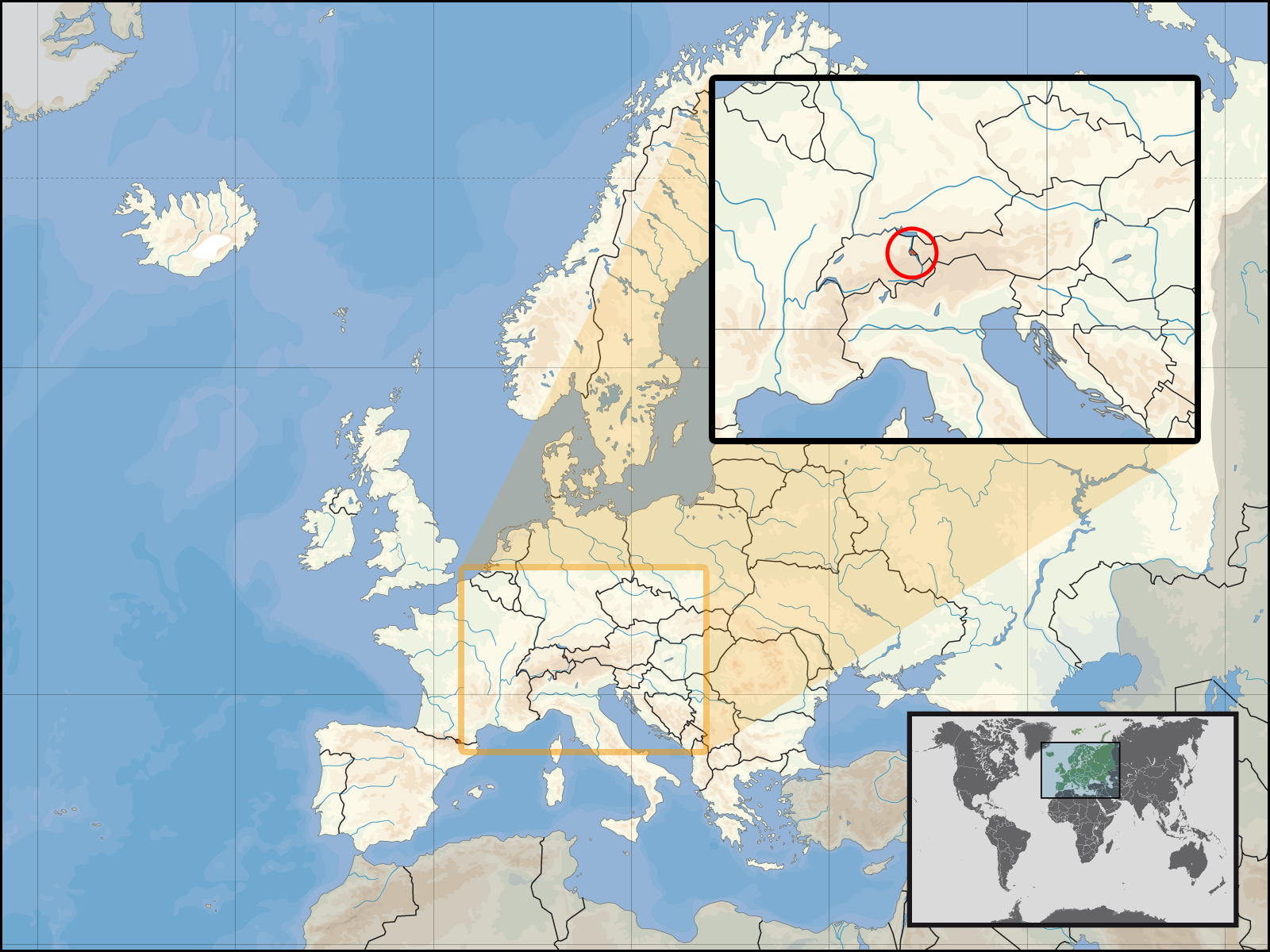 Lage des Fürstentums Liechtenstein in EuropaStand: Oktober 2006